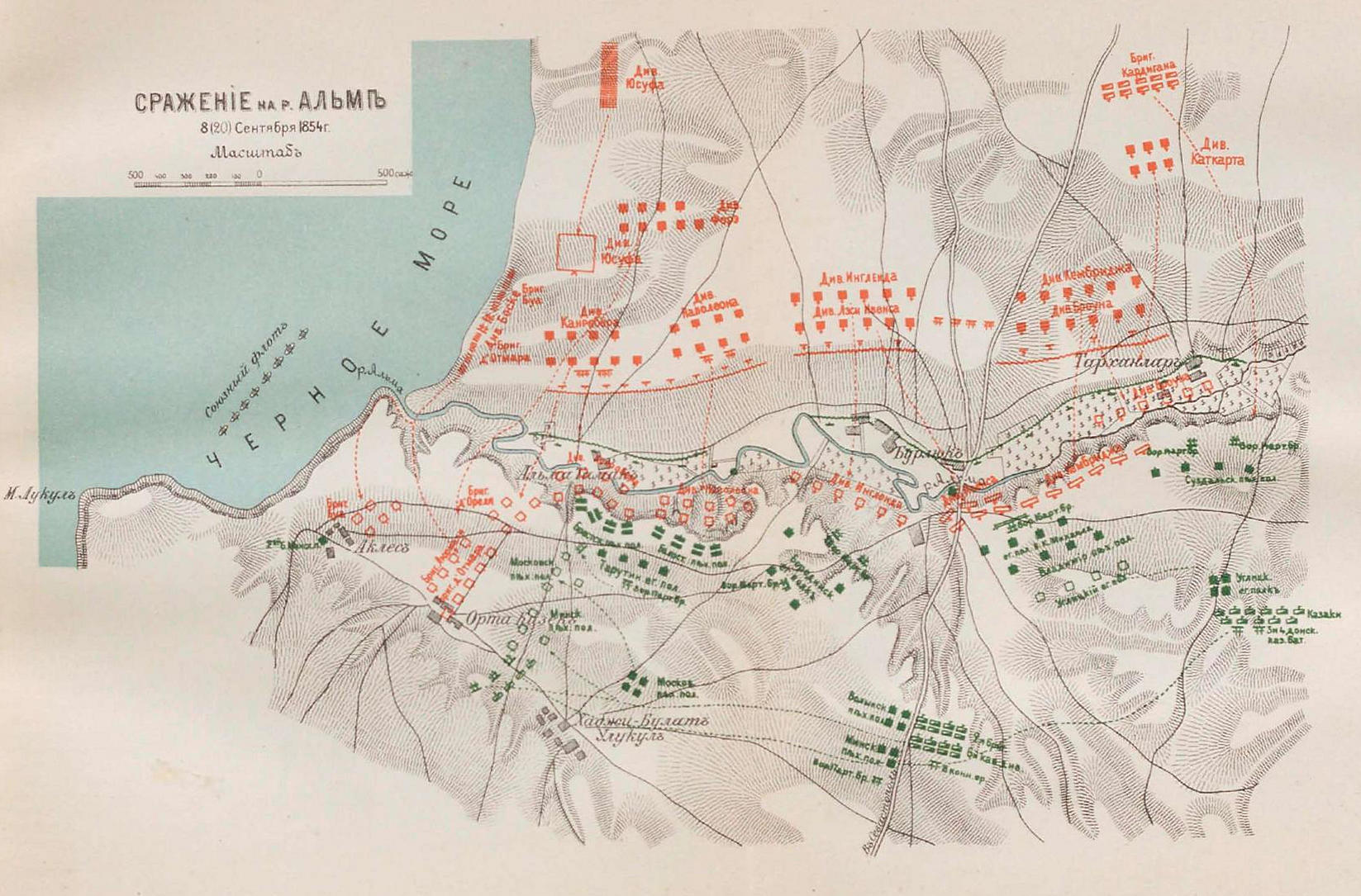 Данное изображение было использовано в статье «Альма» опубликованной во втором томе «Военной энциклопедии», который был издан книгоиздательским товариществом Ивана Дмитриевича Сытина в 1911 году в столице Российской империи городе Санкт-Петербурге.